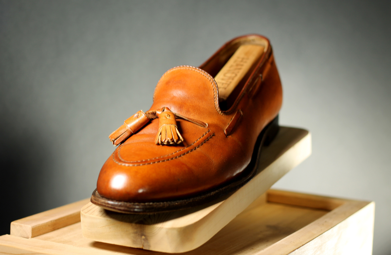 Alden tassel moc